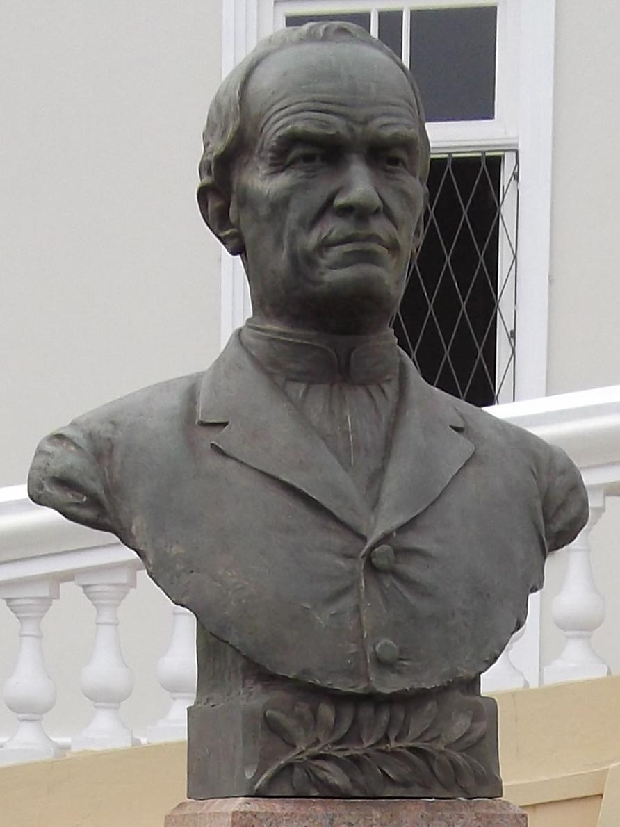 Busto de Joaquim Cacique de Barros no pátio do Asilo Padre Cacique, porto Alegre, Brasil